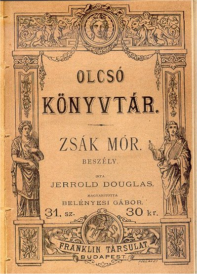 Az Olcsó Könyvtár 31. kötete 1877-ből